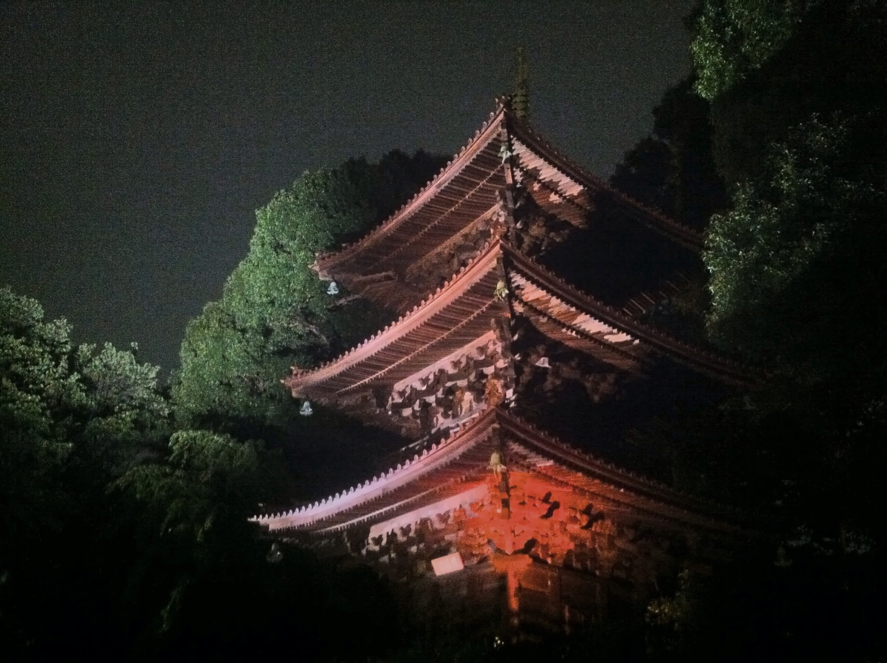 椿山荘の仏塔、夜 Chinzanso pagoda, night